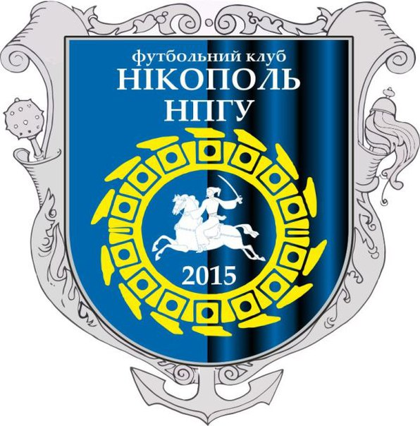 Офіційна емблема клубу "Нікополь-НПГУ"